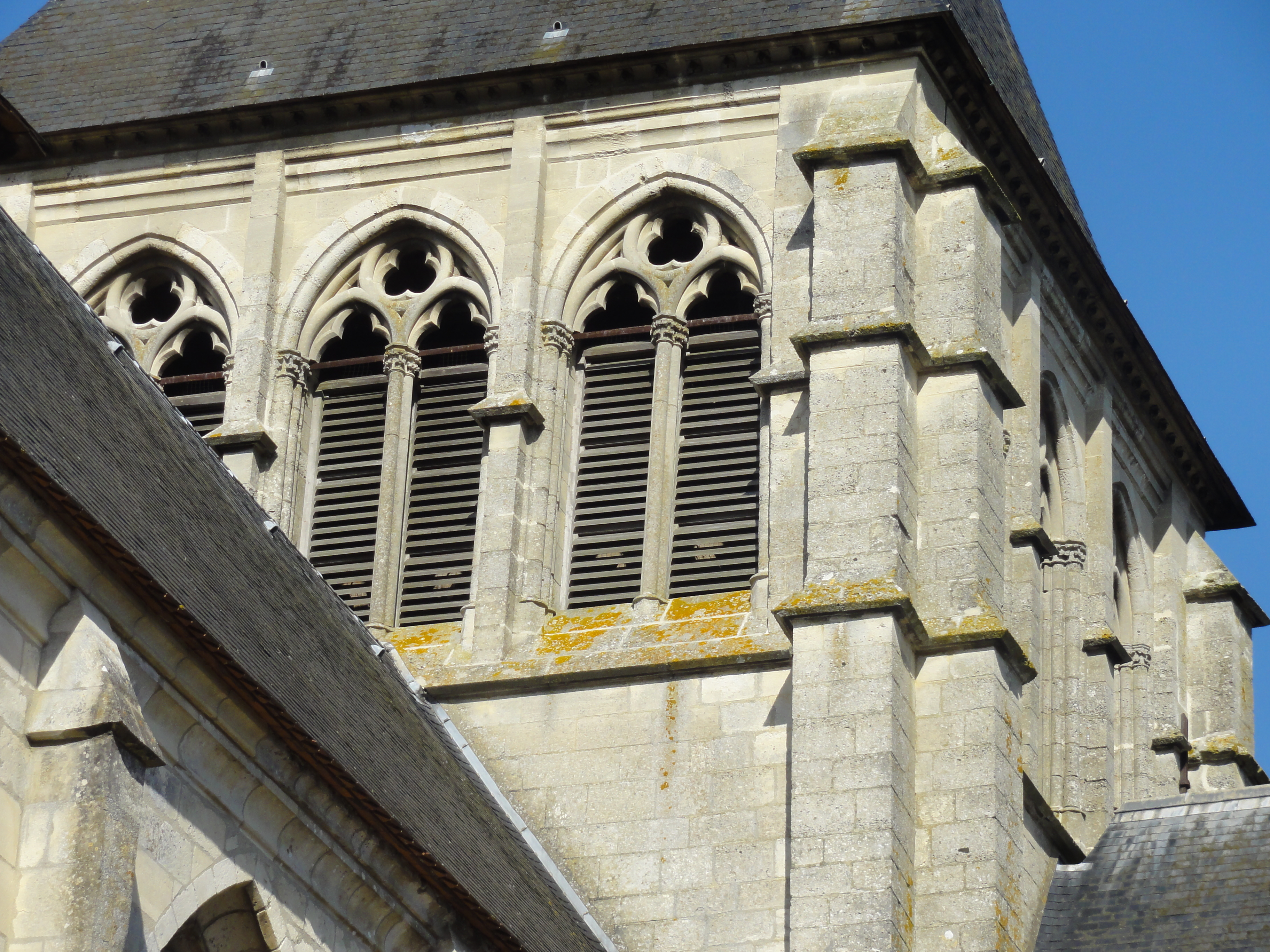 Clocher.